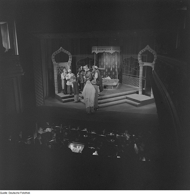 Original image description from the Deutsche Fotothek Freiberg. Stadttheater, Szene einer Aufführung